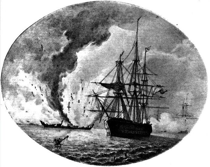 Линейный корабль "Азов" (1827 год)